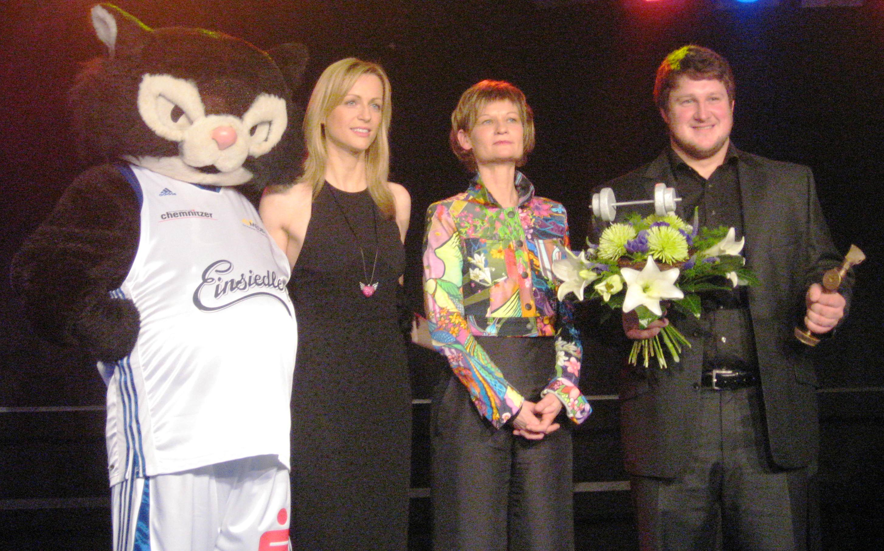 Verleihung des Chemmy 2009 an Matthias Steiner, mit Barbara Ludwig (Oberbürgermeisterin von Chemnitz, Mitte) und Inge Posmyk (links)